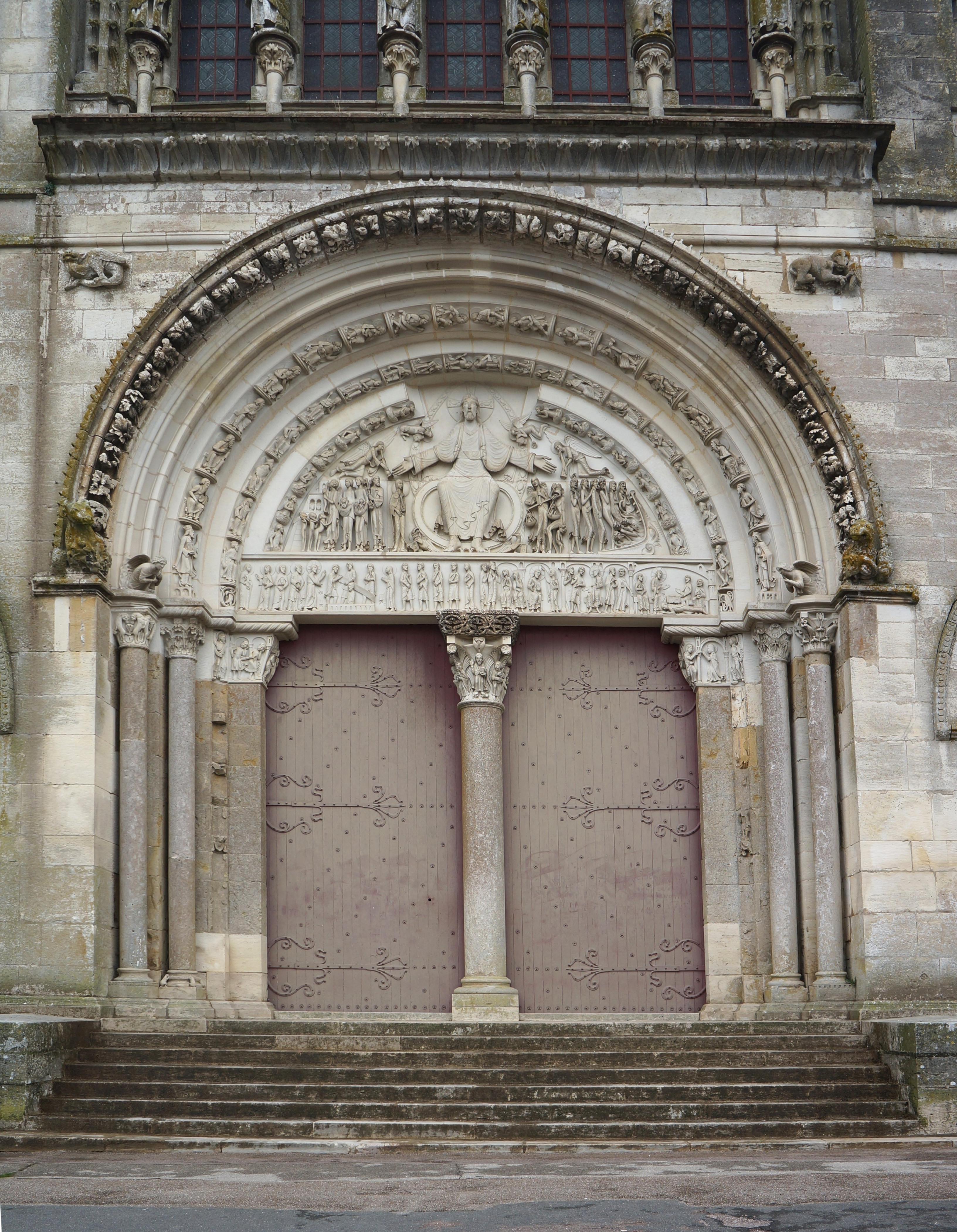 Tympan (externe) de la Basilique Sainte-Marie-Madeleine_de_Vézelay, Vézelay Yonne, Bourgogne, France .